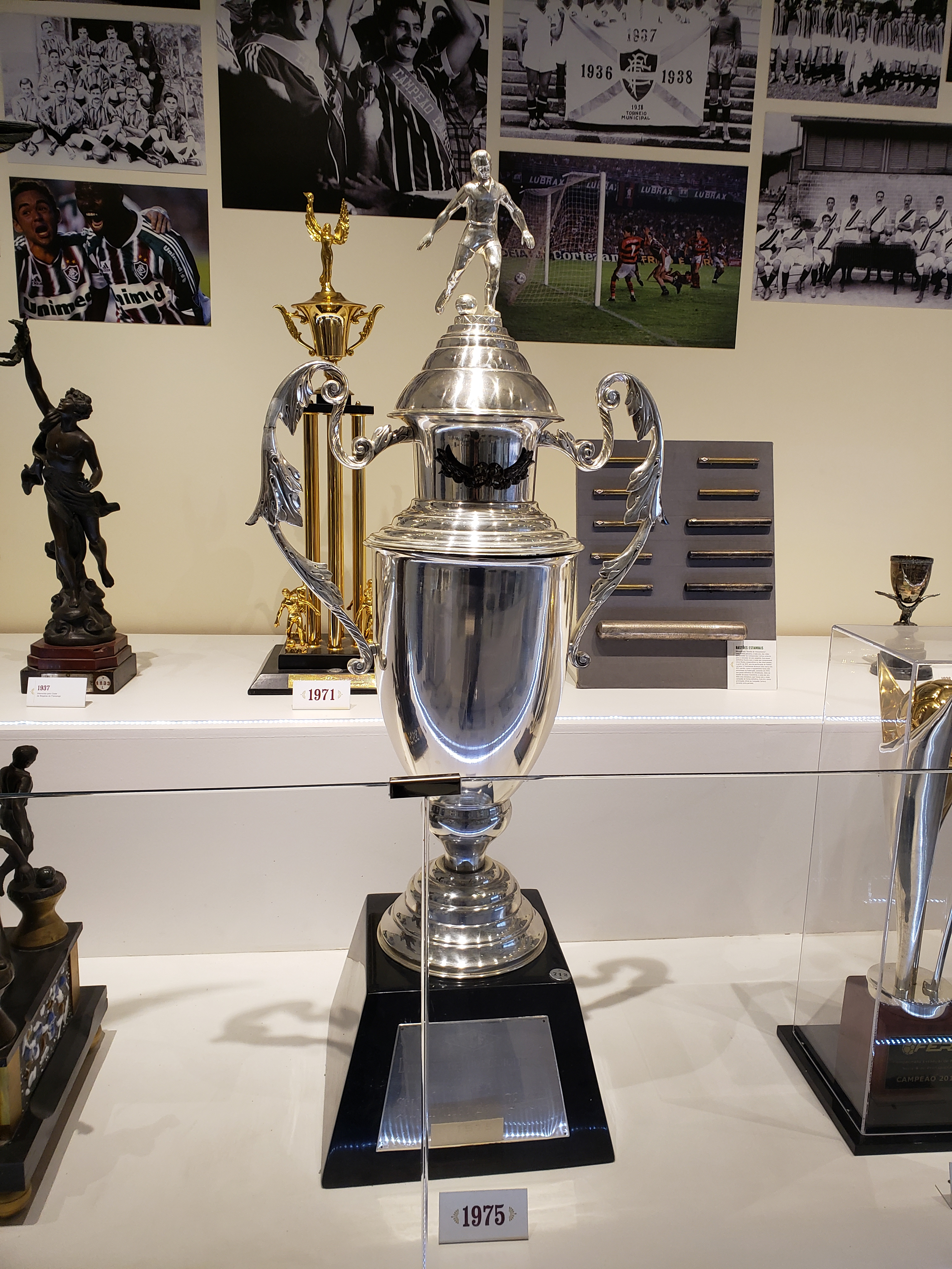 Taça do Campeonato Carioca de Futebol de 1976, conquistado pelo Fluminense Football Club contra o Botafogo